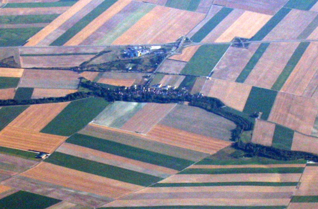 Vue aérienne du village d'Haussimont. (Marne, région Alsace-Champagne-Ardenne-Lorraine).